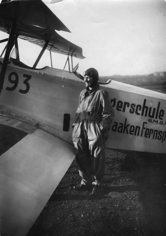 Marga von Etzdorf Unter Leitung des Herrn Oberlt. a.D. Benzler, Chefpiloten der Fliegerschule Bornemann G.m.b.H. im Kriege Führer einer Jagdstaffel, legte heute auf dem Flugplatz Staaken die 20 jährige Marga v. Etzdorf als erste Berlinerin in Gegenwart ihres Grossvaters Generallt. Ex. v. Etzdorf ihr Pilotenexamen ab. 21869-27 [Berlin-Staaken.- Marga von Etzdorf in Fliegermontur vor einem Flugzeug der Flugschule Bornemann, stehend, am Tag Ihrer Pilotenprüfung] Abgebildete Personen: Etzdorf, Marga von: 1907-1933; Kunstfliegerin, Deutschland (GND 12355800X)